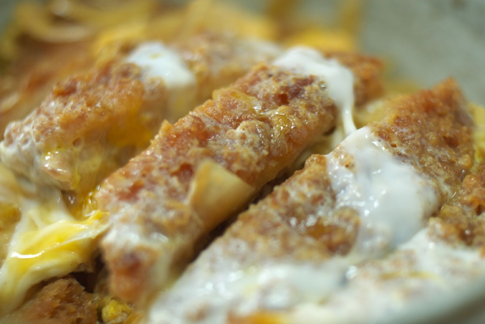 pork cutlet donburi.